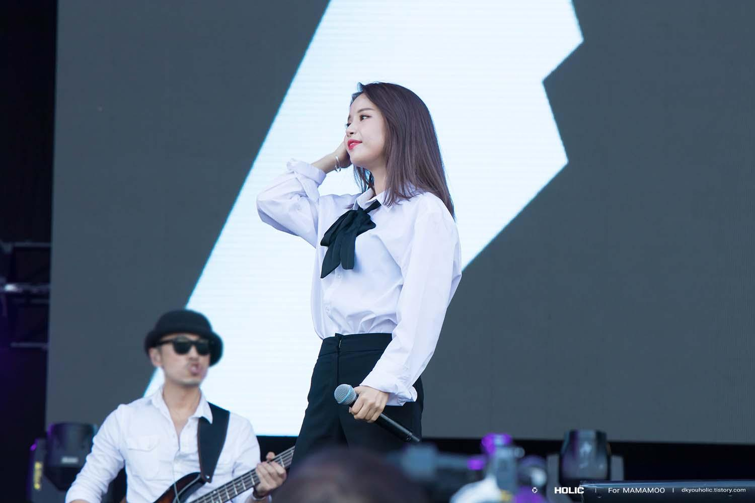 17.09.23 조이올팍페스티벌 - 마마무(MAMAMOO)